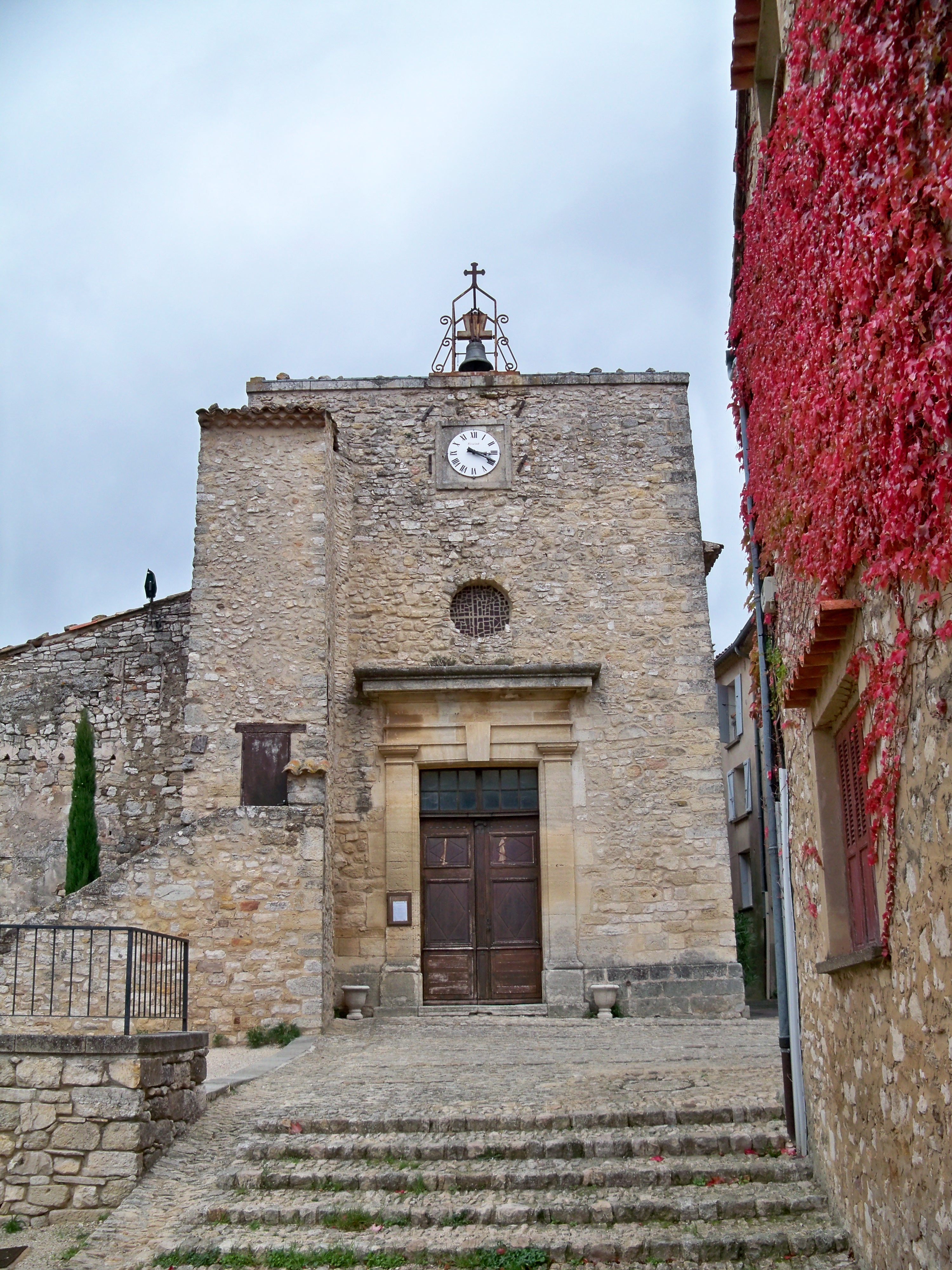 église de Caseneuve, Vaucluse, France